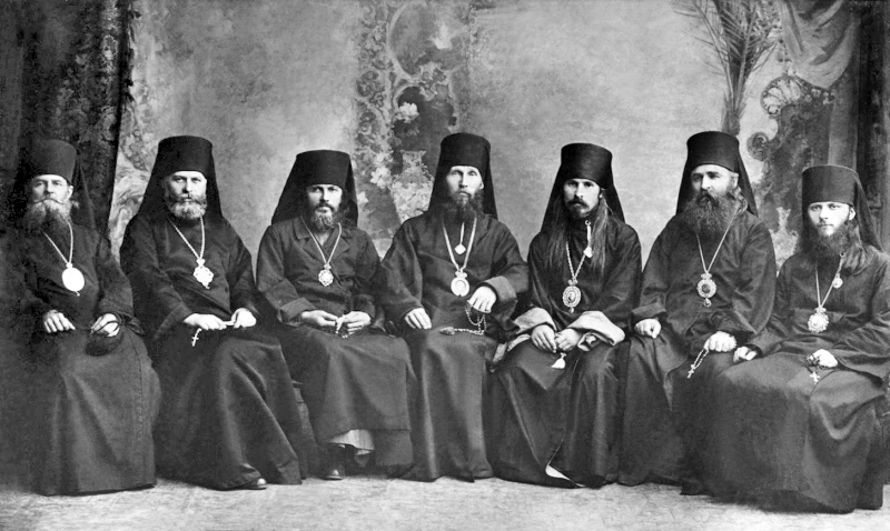 Православные иерархи. УССР, Харьков / 1924 год. Слева направо: епископ Александровский Стефан (Андриашенко), епископ Епископ Сумской Константин (Дьяков), епископ Епископ Старобельский Павел (Кратиров), епископ Уфимский Борис (Шипулин), Епископ Елизаветградский Онуфрий (Гагалюк), Епископ Глуховский Дамаскин (Цедрик), епископ Мариупольский Антоний (Панкеев). Все изображённые на фото священослужители были репрессировны - расстреляны.